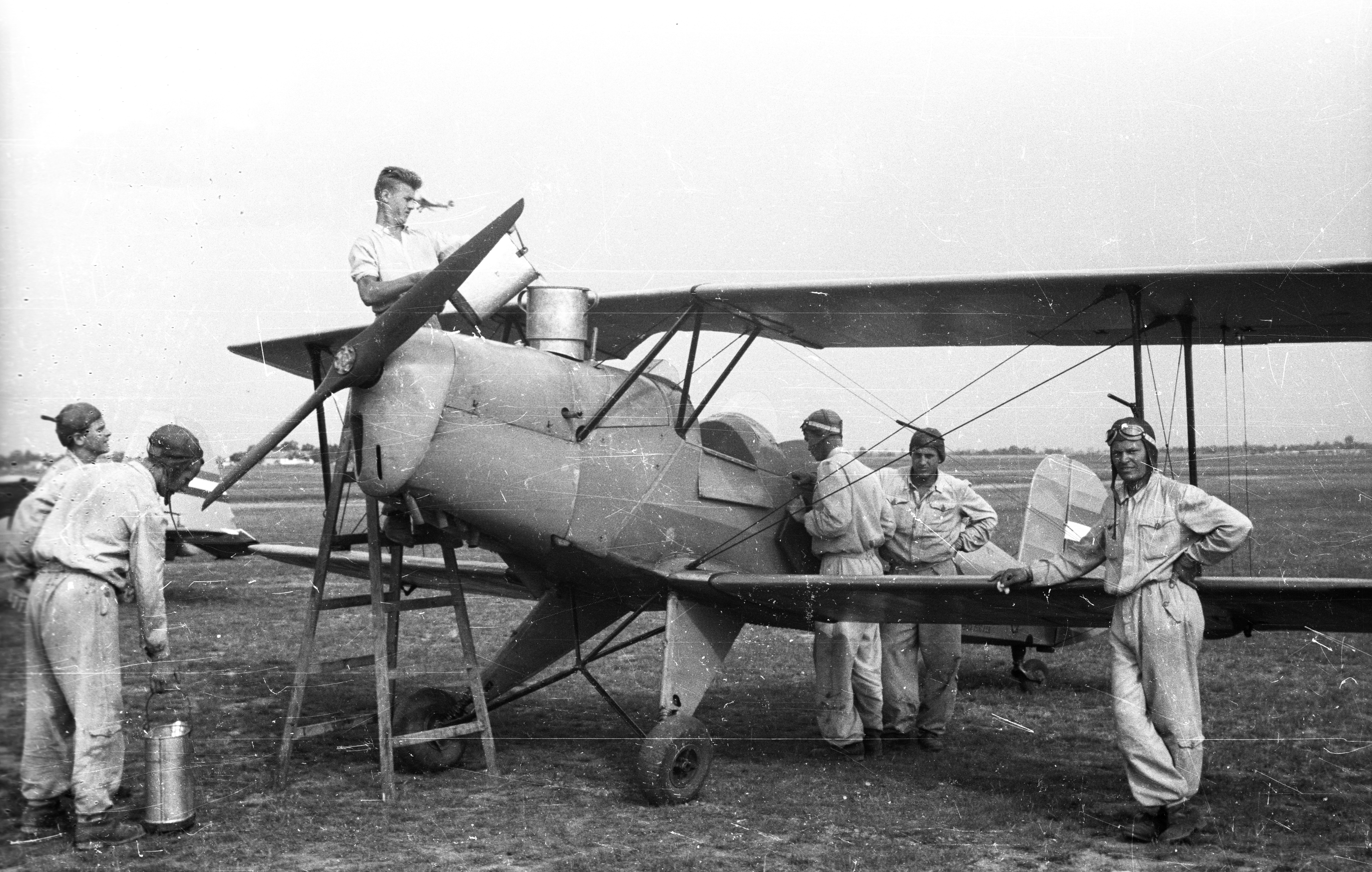 repülőtér, Bücker Bü 131 "Jungmann" (Young man) repülőgép, magyar neve "Csíz". Location: Hungary, Szentes Tags: airplane, airport, pilot, Gerrman brand, transport, ladder, biplane Title: repülőtér, Bücker Bü 131 \